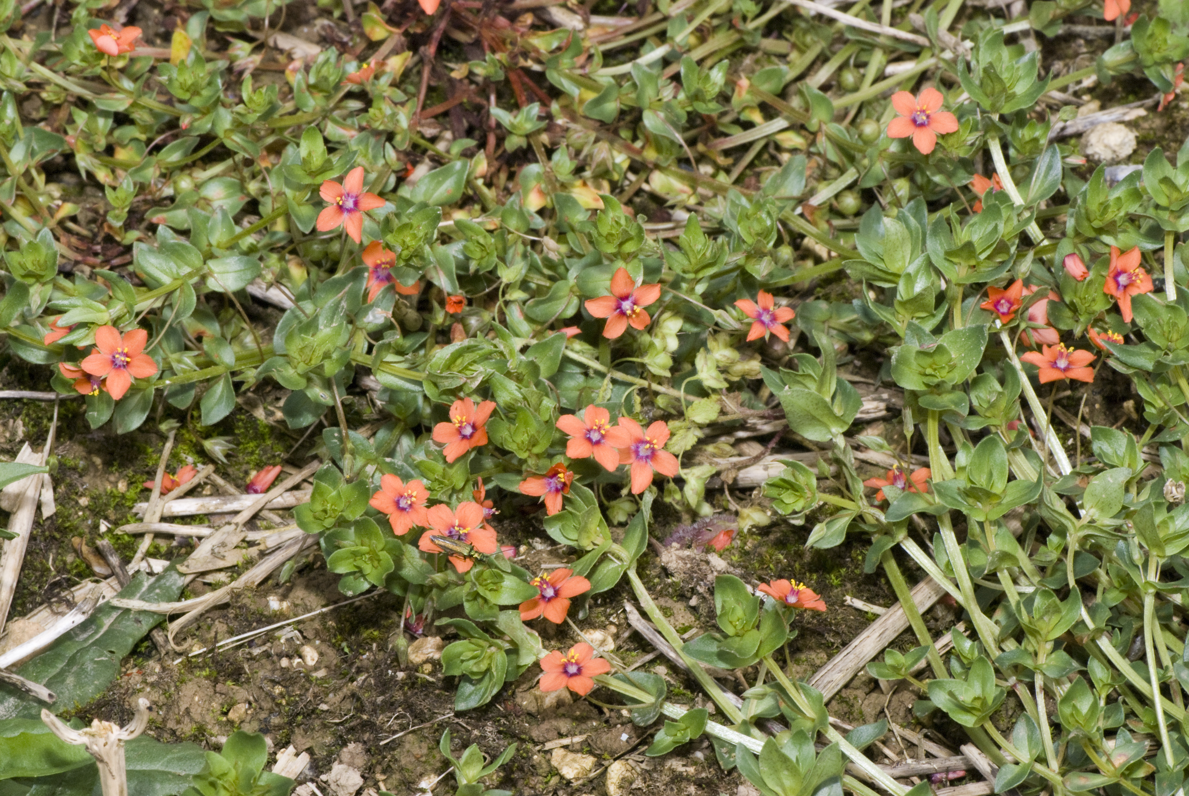 Anagallis arvensis - Mouron des champs - Saint-fuscien (Somme) le 19/05/2007